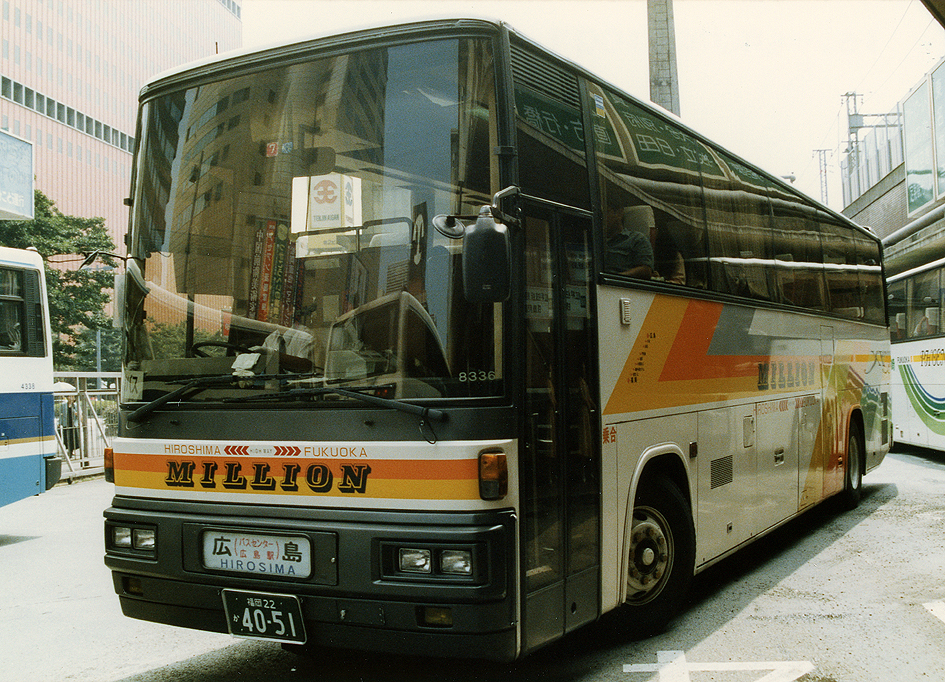 西日本鉄道 高速バス MILLION 日野・ブルーリボン RU638BB 西工SD-I